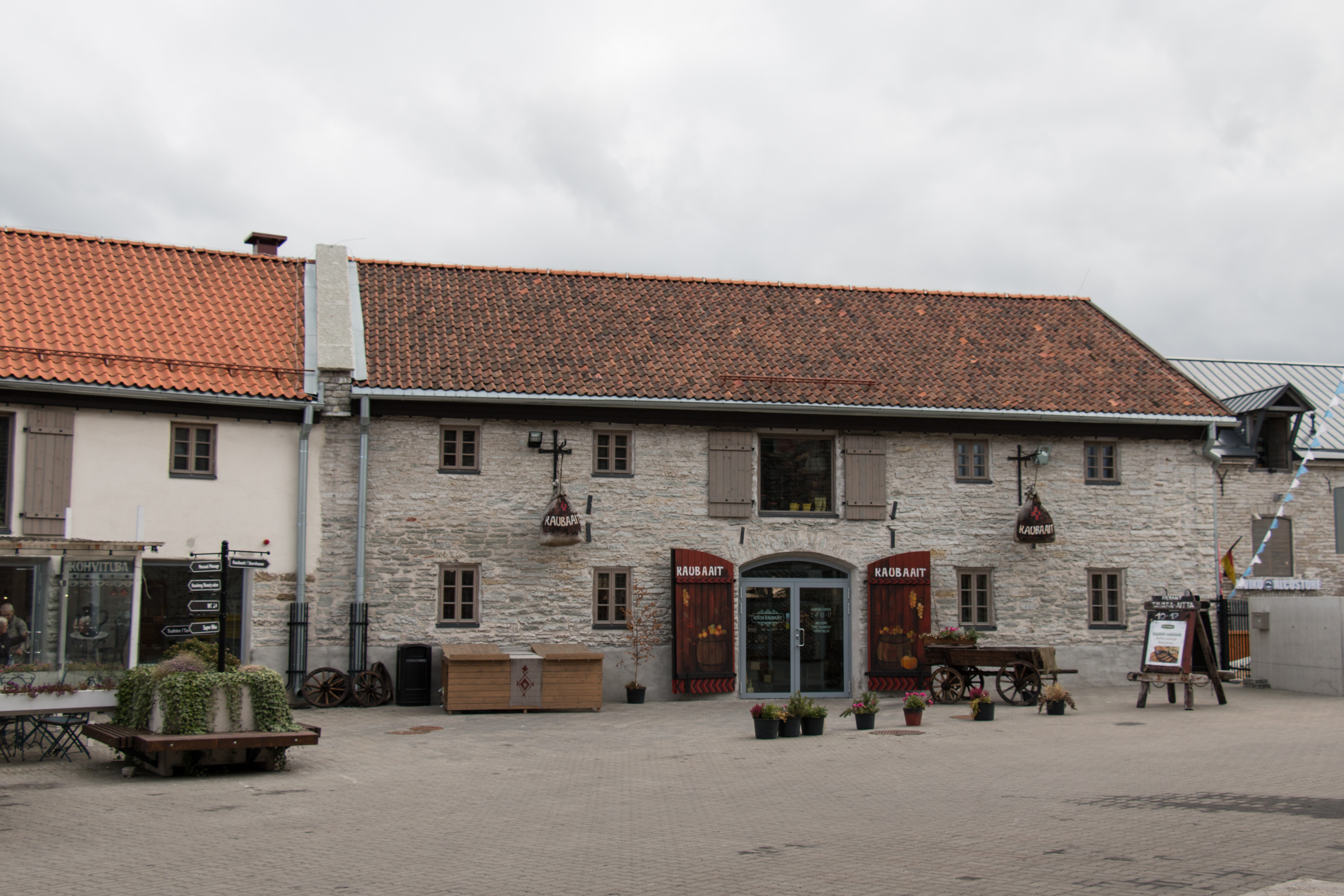 Kochi kaubaait